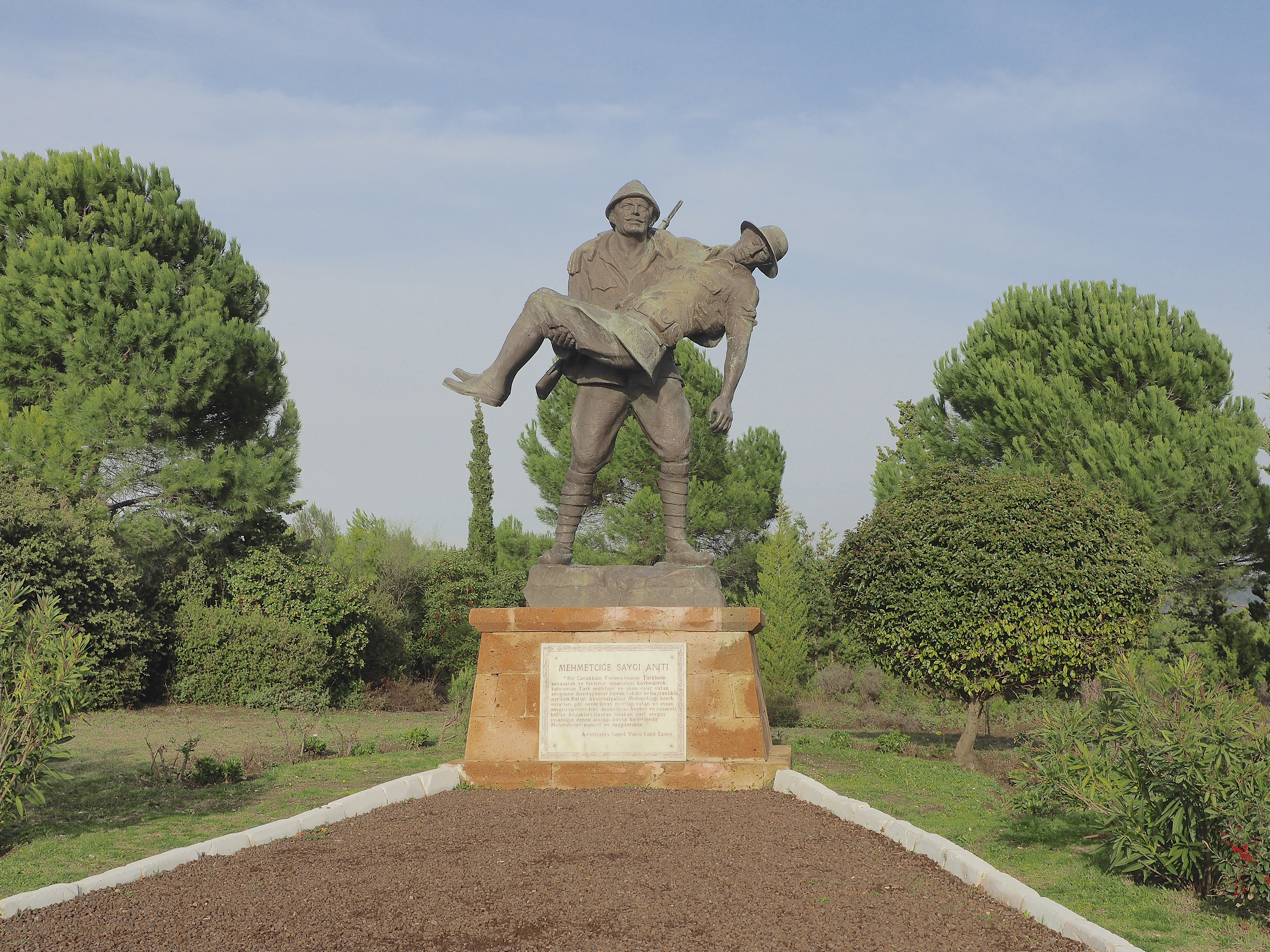 Mehmetçiğe Saygı Anıtı, Çanakkale. Gallipoli Battlefield